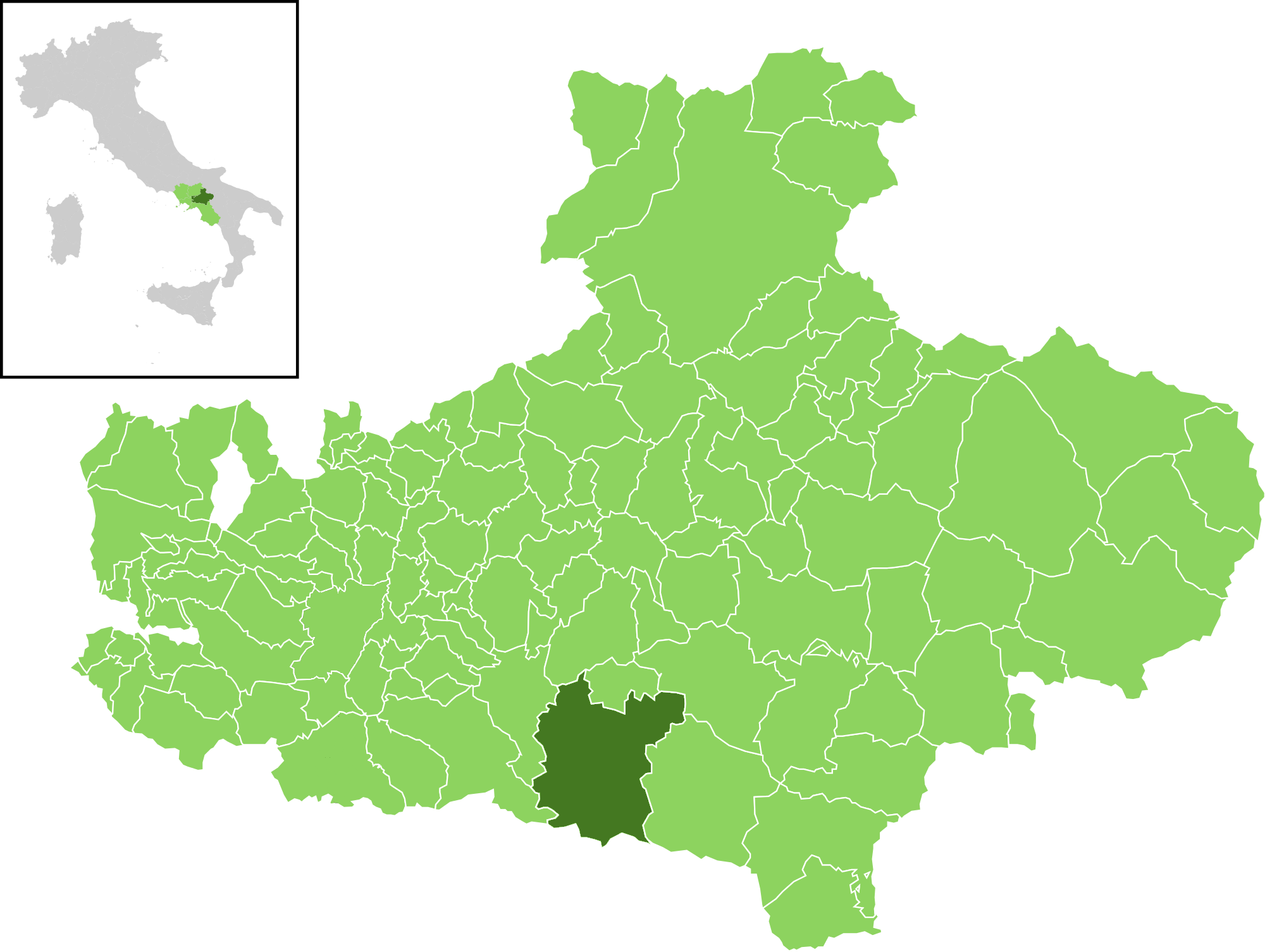 Posizione del comune all'interno della provincia di Avellino